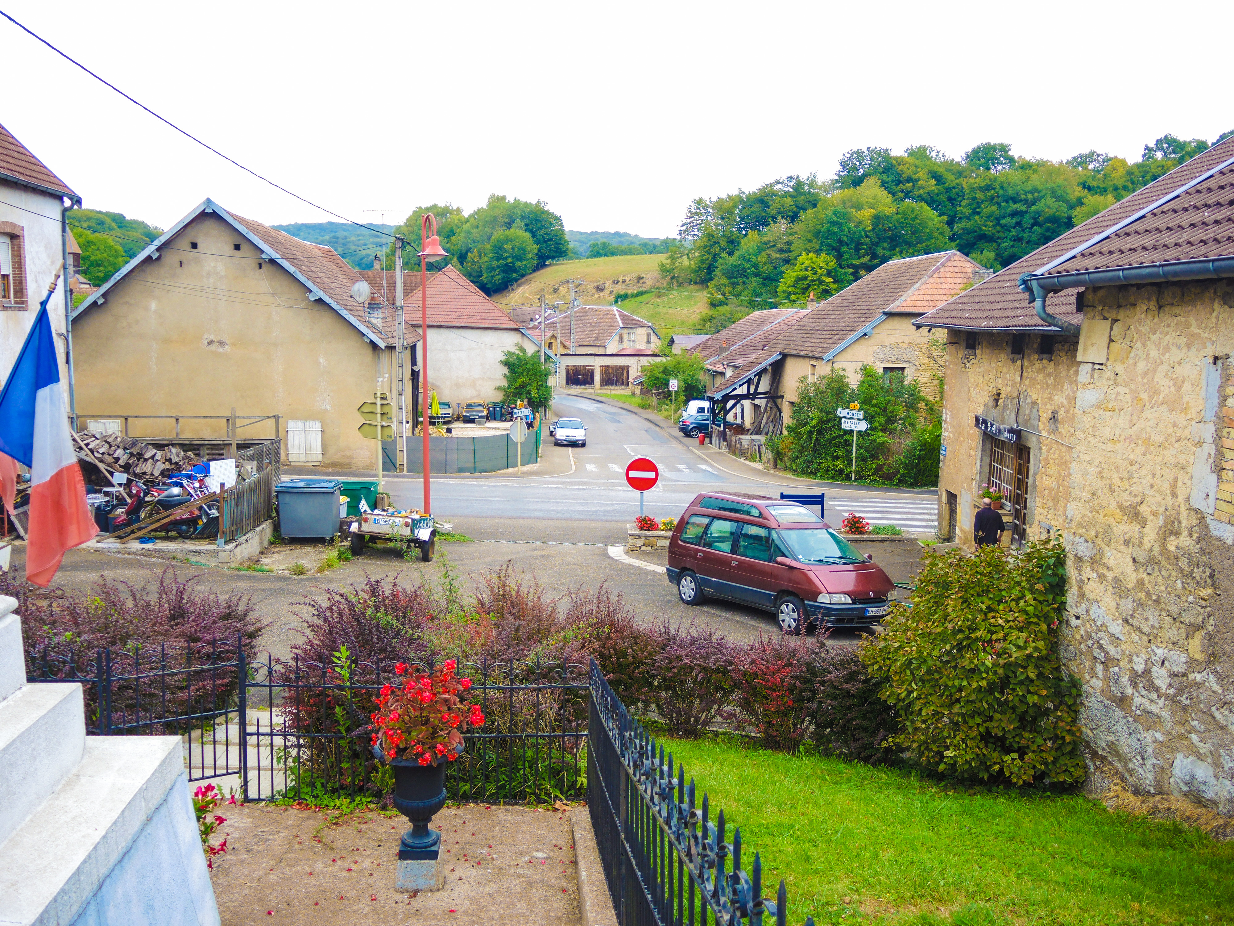 Centre du village de Chaudefontaine, vu depuis la mairie. Doubs.